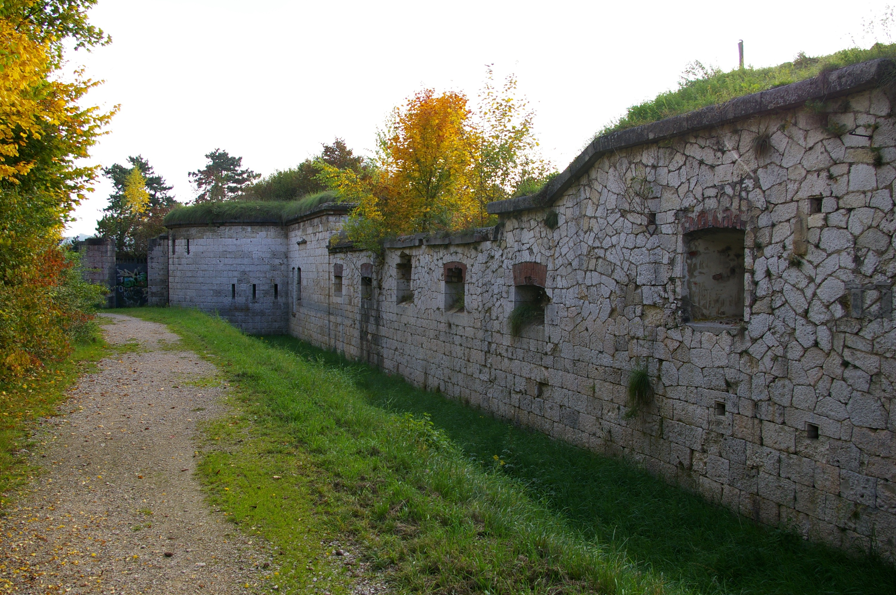 Kehlmauer des Forts Söflinger Turm